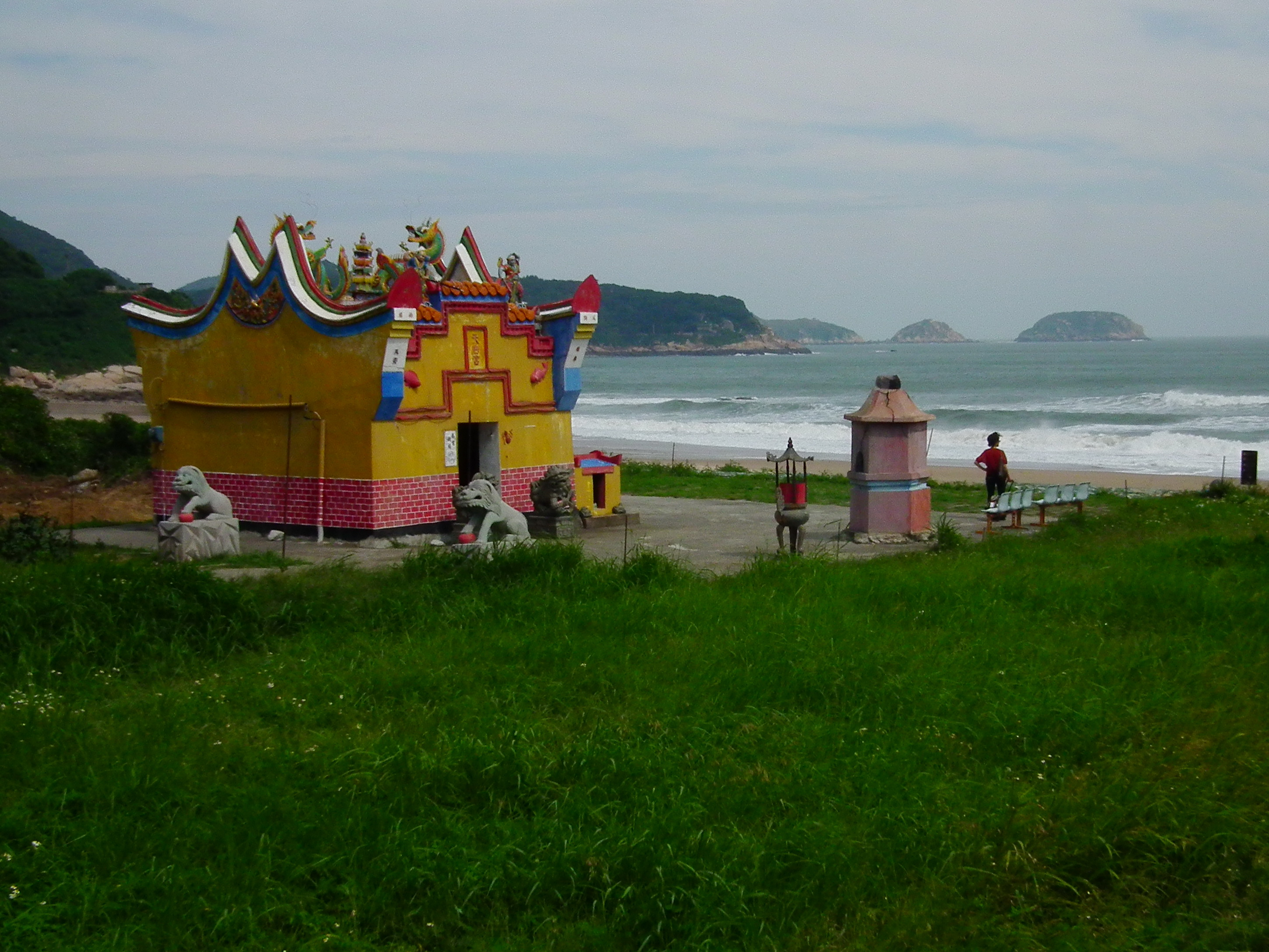 Banli Tianhou Temple 坂里天后宮